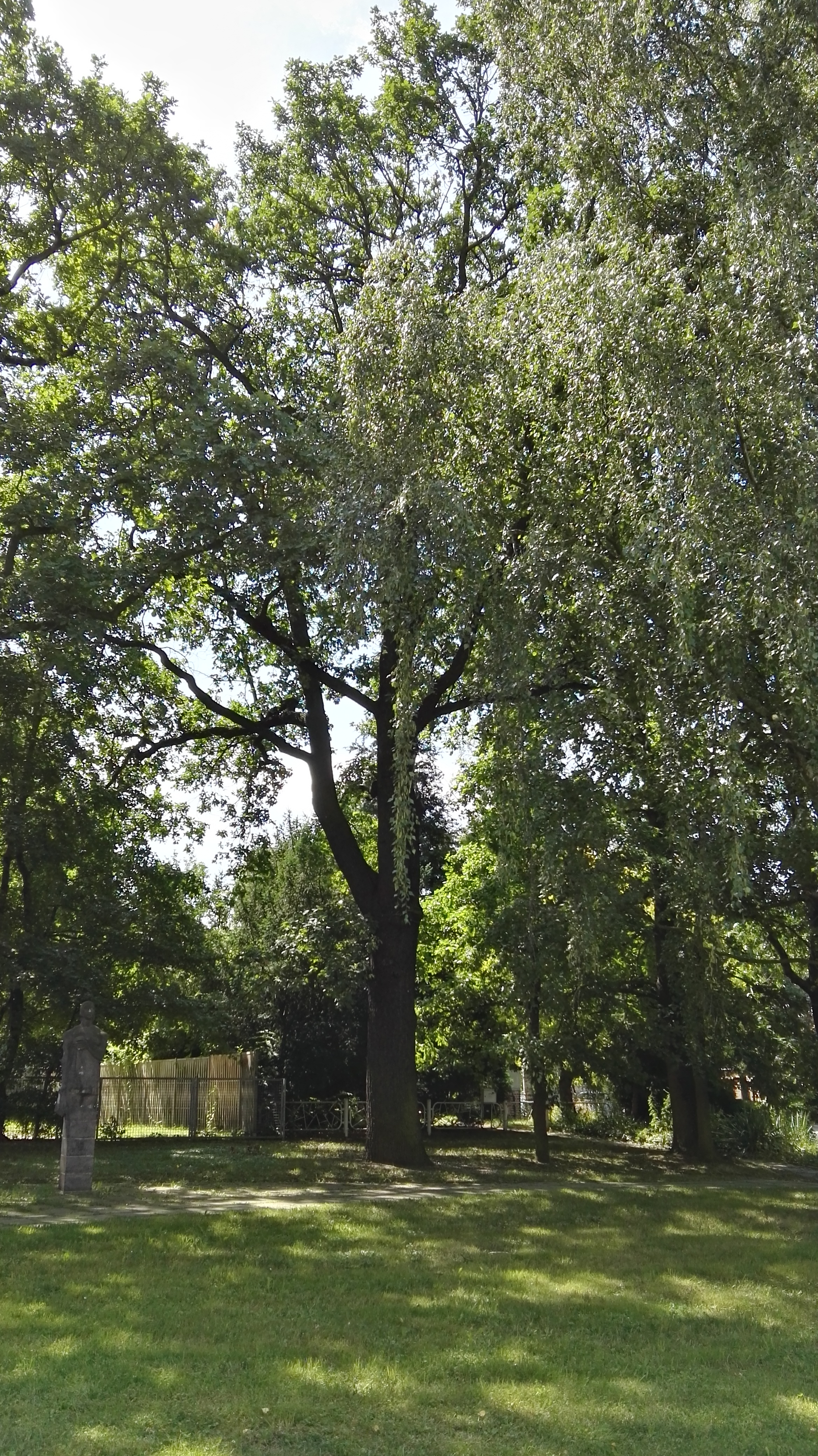 Naturdenkmal in Senftenberg Nr. 0100-9; Stieleiche (Quercus robur) nordwestlich außerhalb des Kindergartens Glück-Auf-Straße, westlicher Baum; Teil der Baumreihe aus Eichen 0100-5 bis 0100-9; links im Bild Plastik "Die Badende" von Ernst Sauer